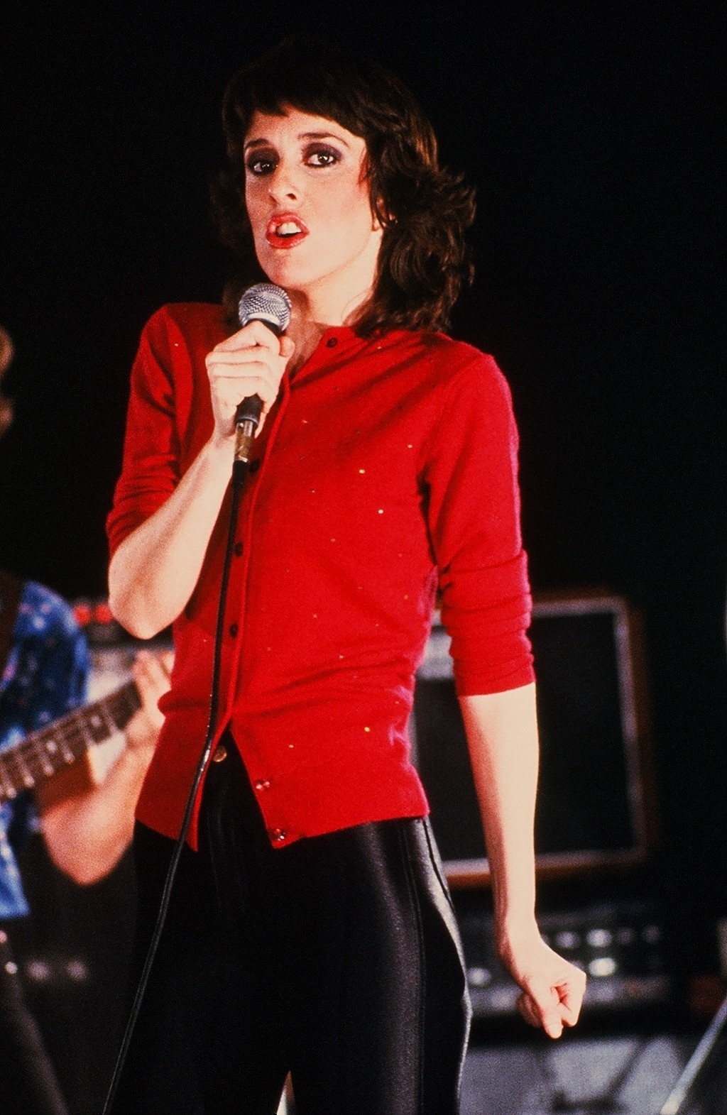 Sue Saad